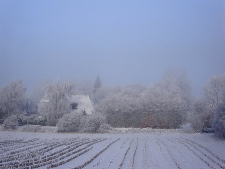 Ruellschau, nach Suedosten (Dez.2012) Richtung Kirche